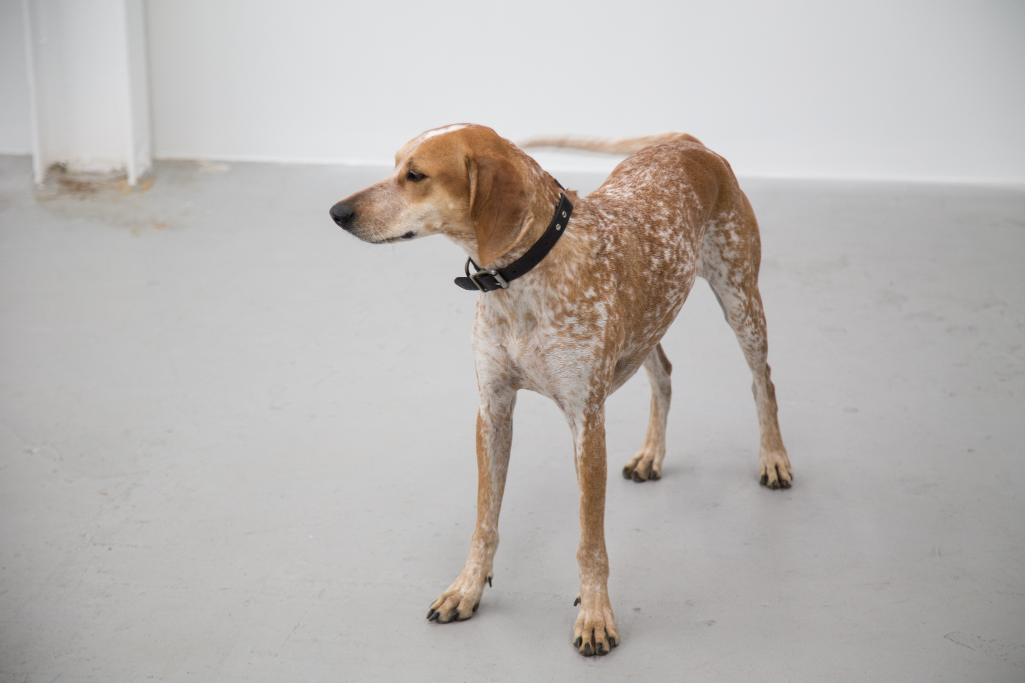 Maddie